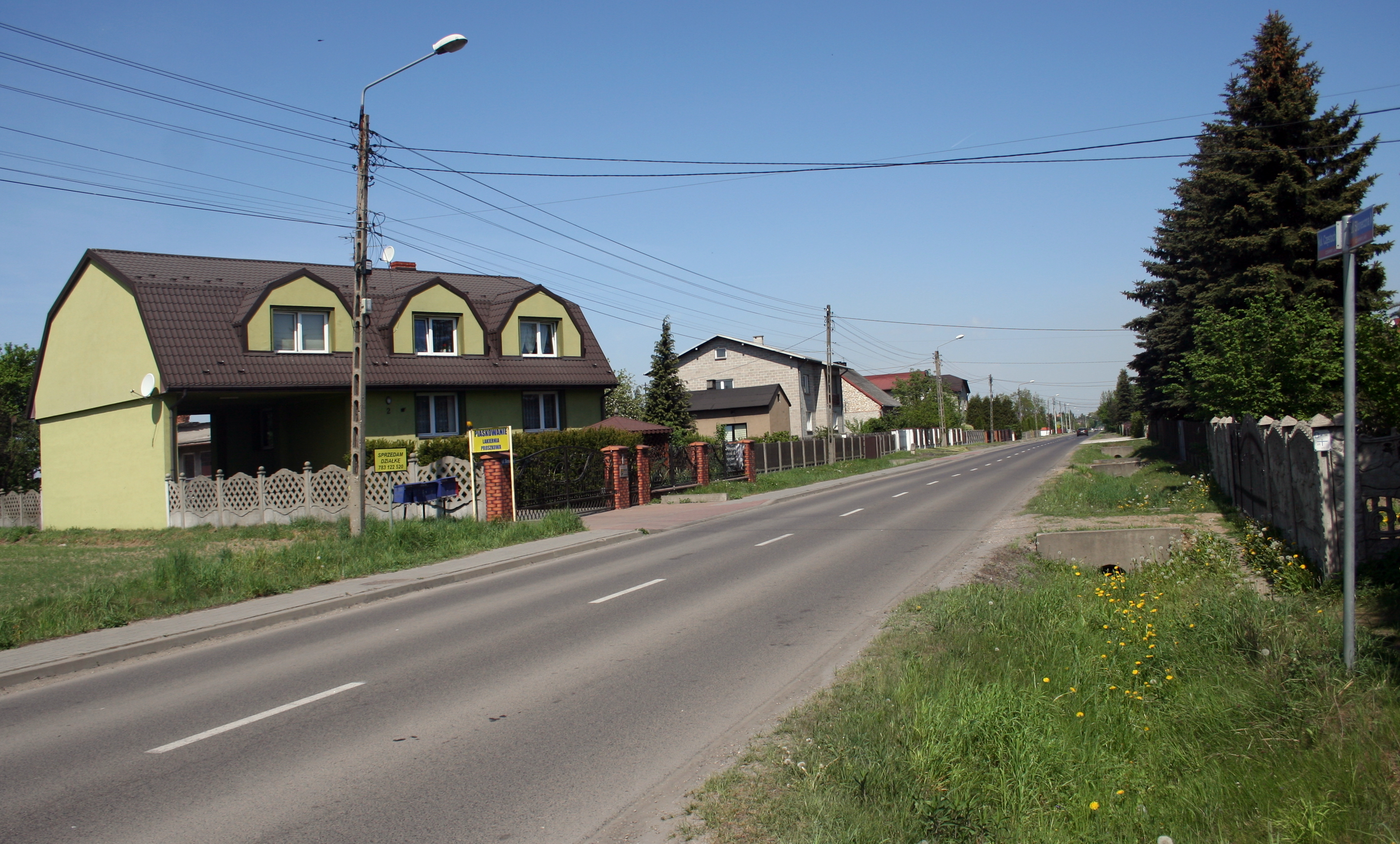 Ulica Częstochowska Czarnym Lesie, gmina Mykanów